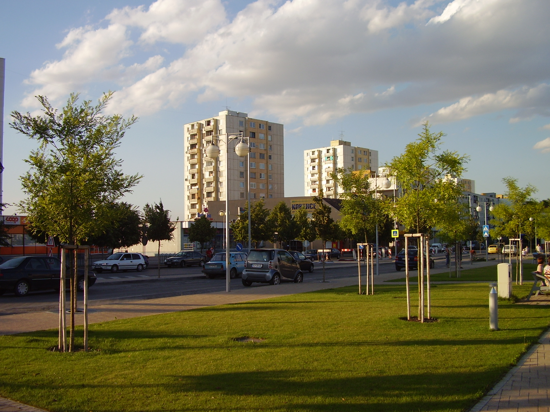 Senec